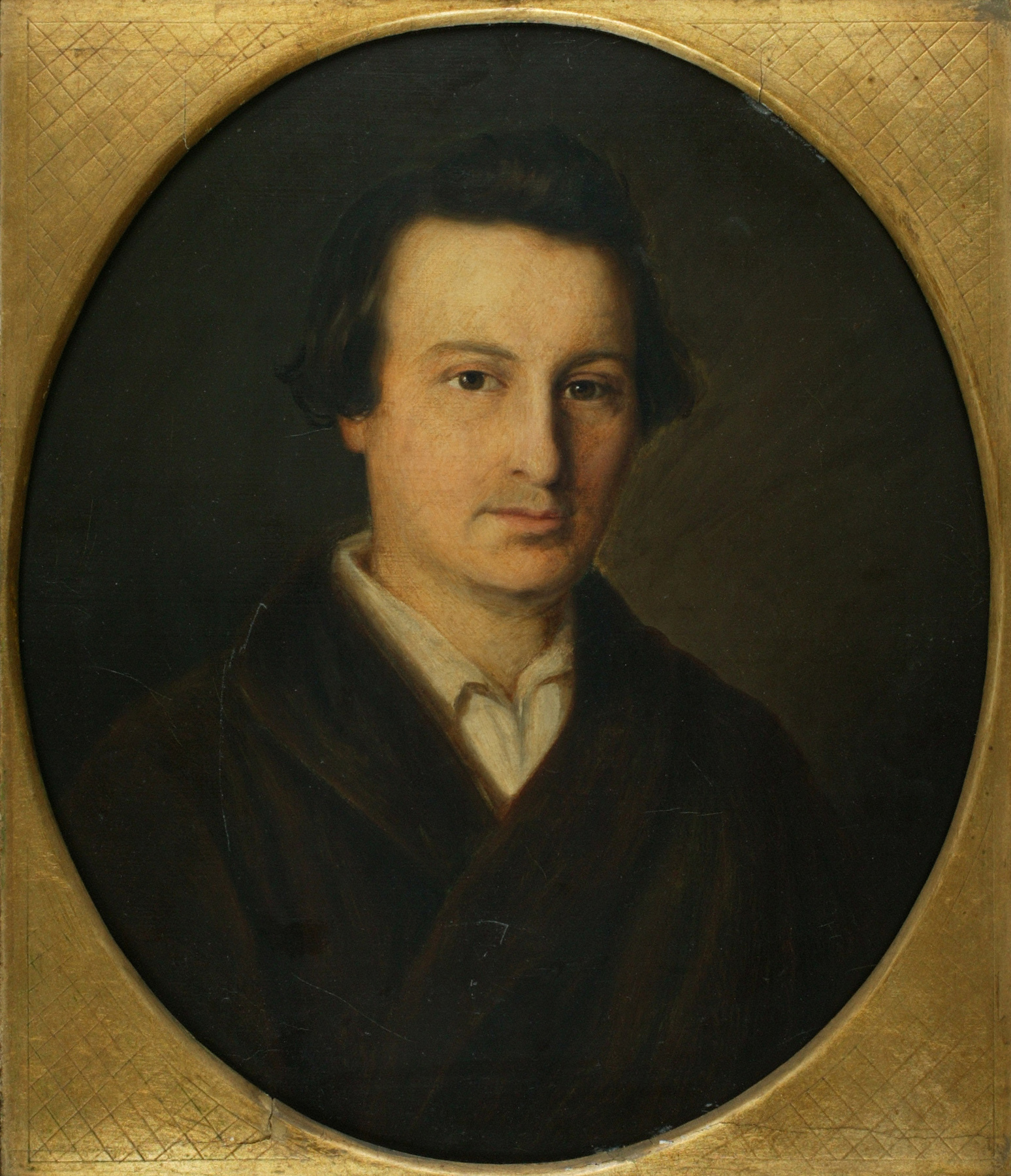 Heinrich Heine; Öl auf Leinwand, Maße: 34,5 x 30 cm Das Original befindet sich heute im Besitz des Heinrich-Heine-Instituts in Düsseldorf